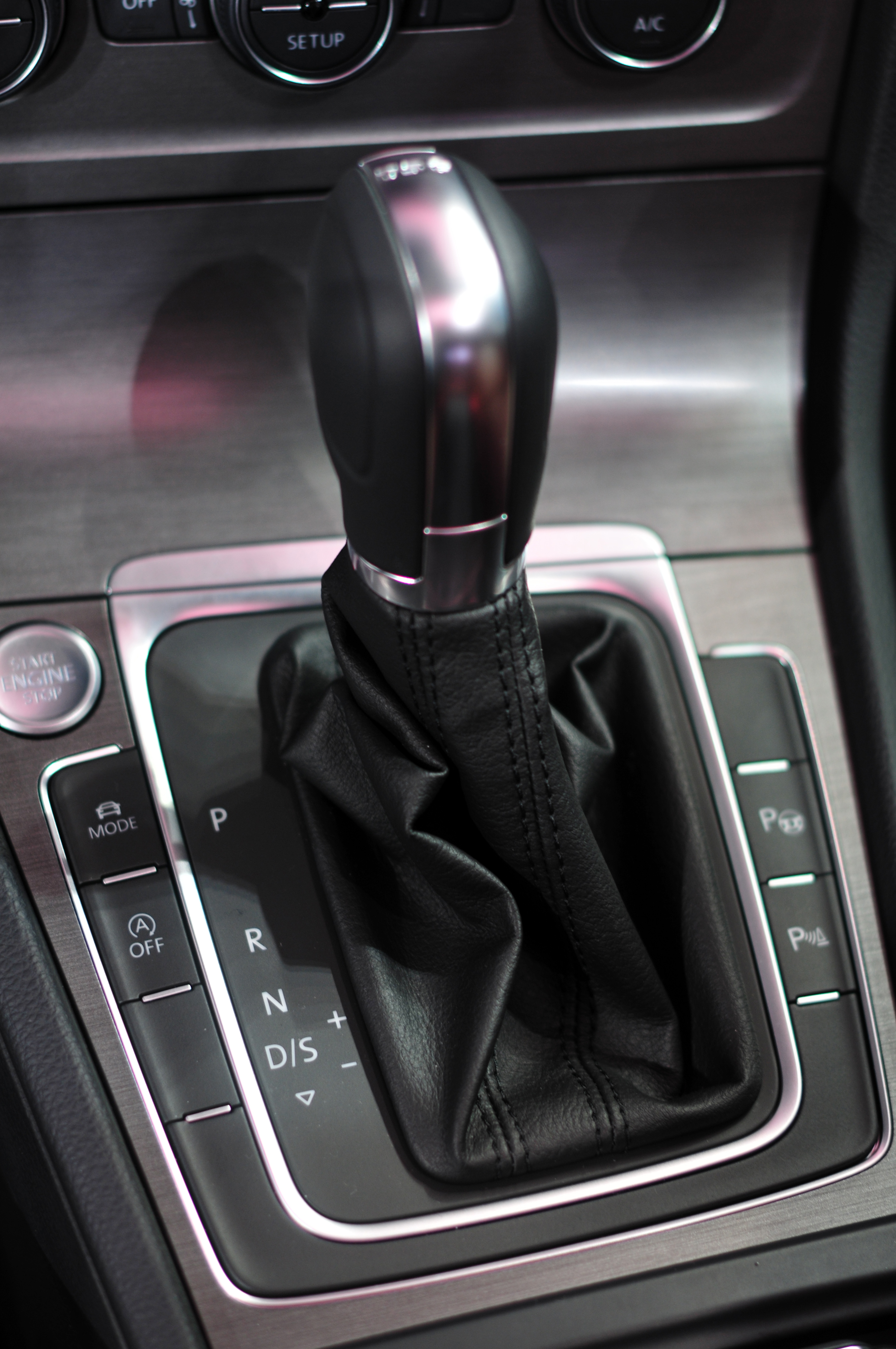 Autostadt Wolfsburg, Golf VII